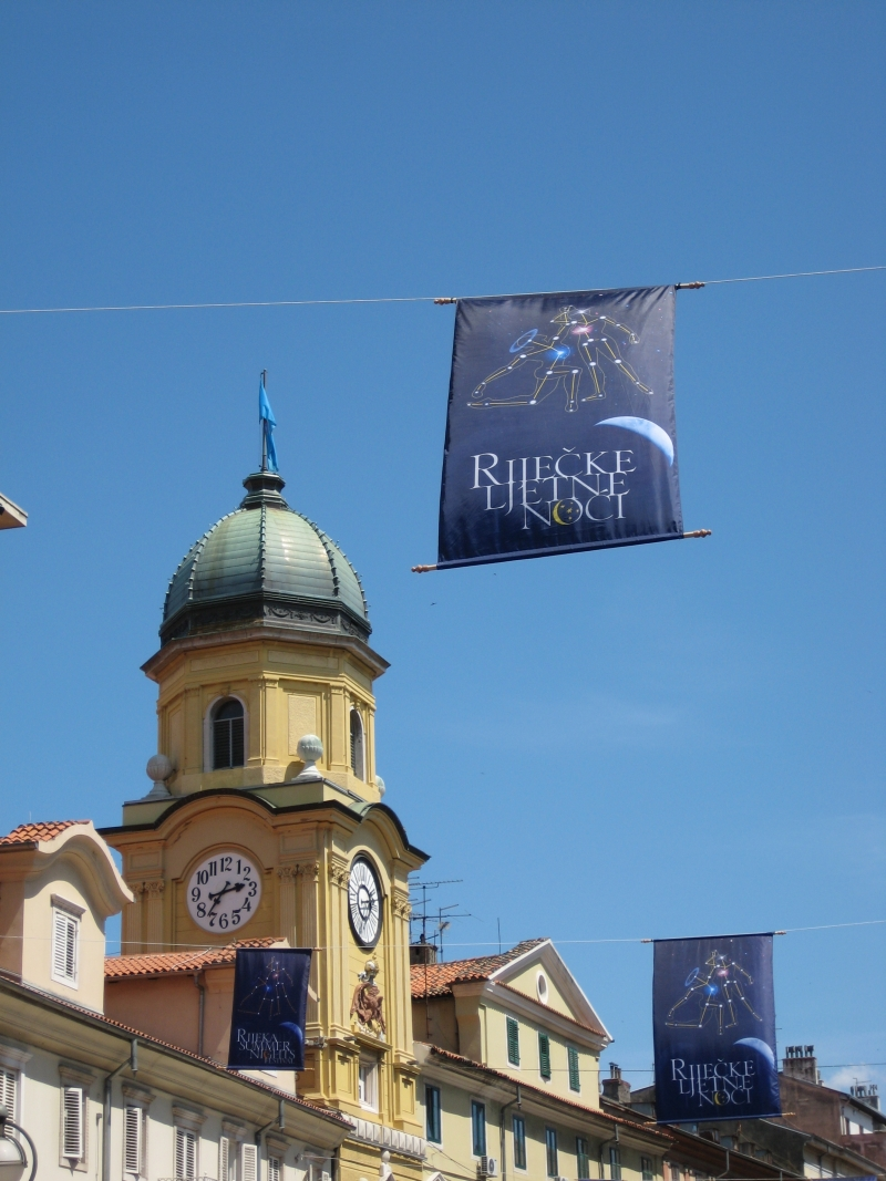 Korzo ukrašen zastavama Ljetnih riječkih noći, Rijeka